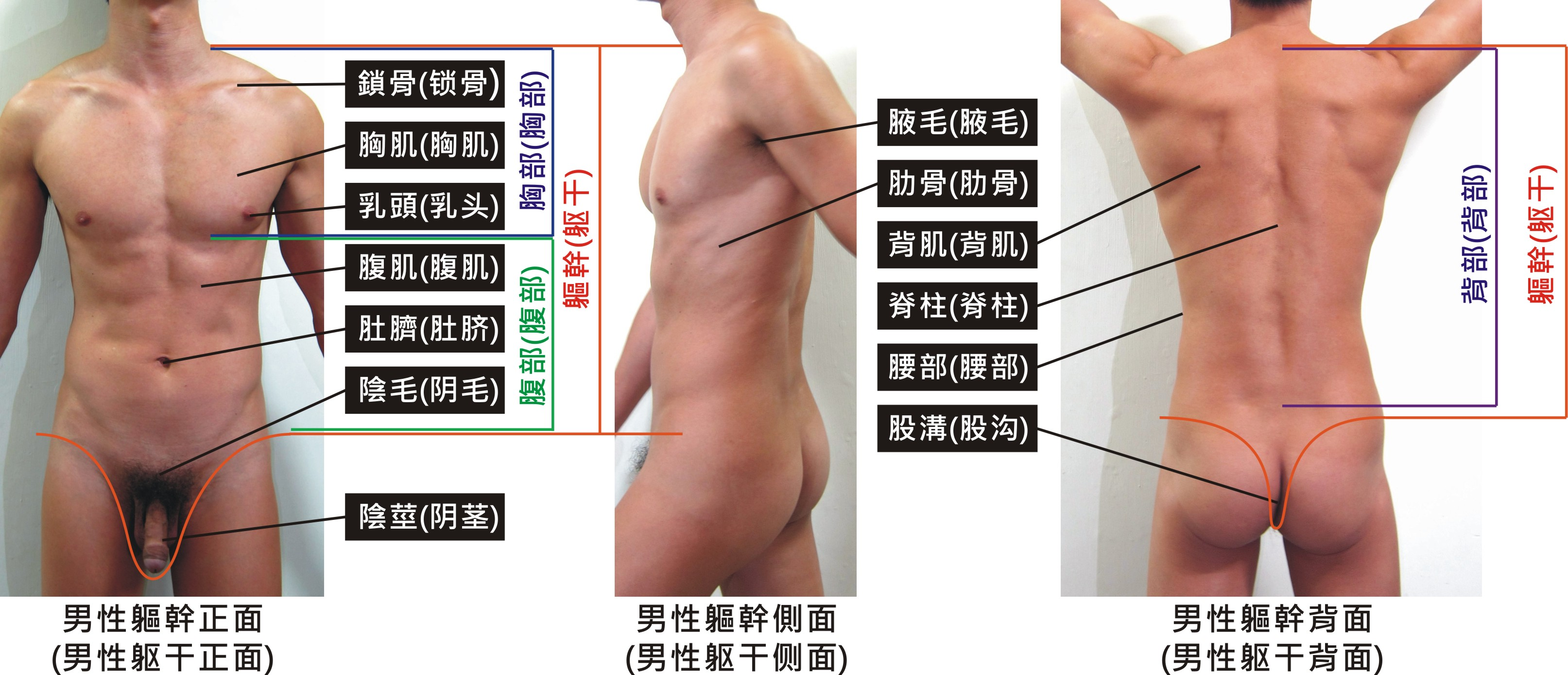 男性軀幹相片